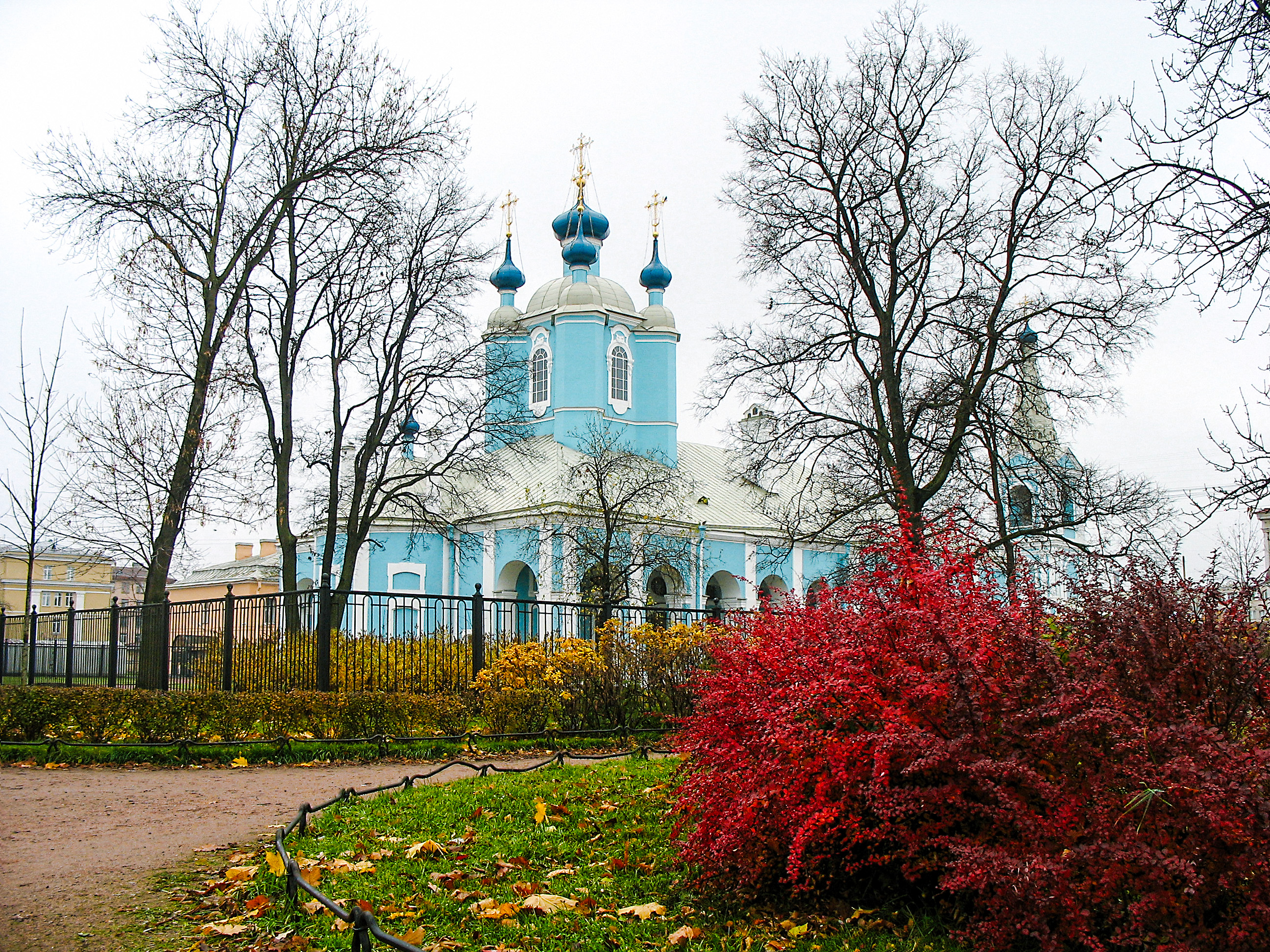 Сампсониевский собор: Большой Сампсониевский проспект, 39А, 41, 41Б, 41В, Выборгский район, Санкт-Петербург